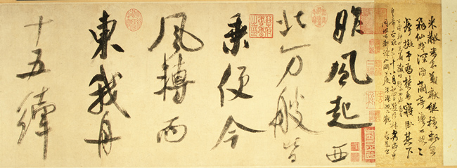 [宋] 米芾 《吴江舟中诗卷》（局部） 纸本墨迹 纵31.3厘米 横559.8厘米 美国纽约私人收藏 来自